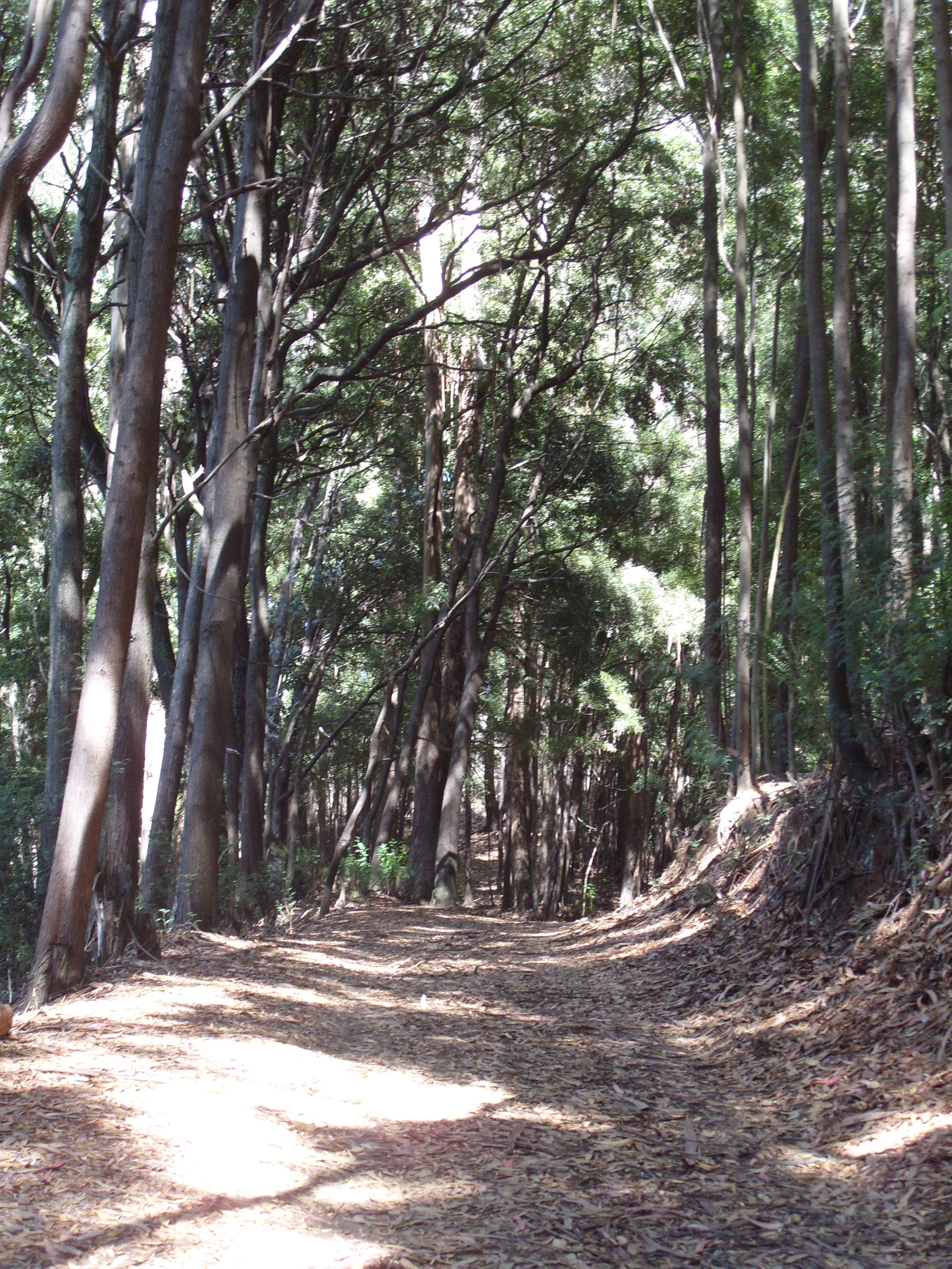 Bosque alrededor de la "Laguna Grande" de San Pedro de la Paz VIII Región del Biobío, Chile Febrero de 2009